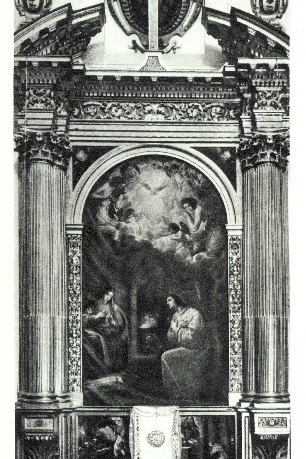 Posteriormente la comunidad de Santo Domingo el Antiguo canceló el contrato. El lienzo original de El Greco se cambió por otro de Eugenio Cajés y el Panteón pasó a otro patrocinador.